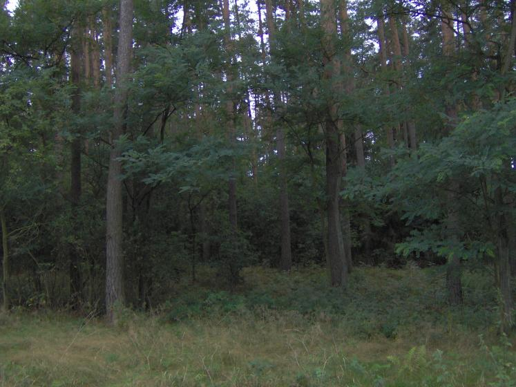 Puszcza Goleniowska w okolicach Goleniowa